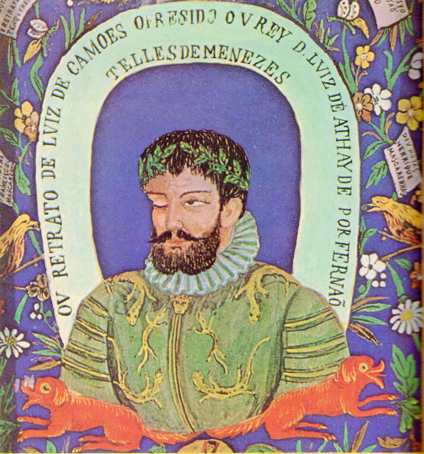 retrato de Camões pintado em Goa, encomendado por Fernão Telles de Menezes e oferecido ao vice-rei Dom Luis de Ataíde